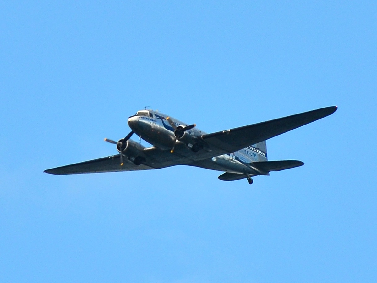 Flygande Veteraners DC-3:a Fridtjof Viking.